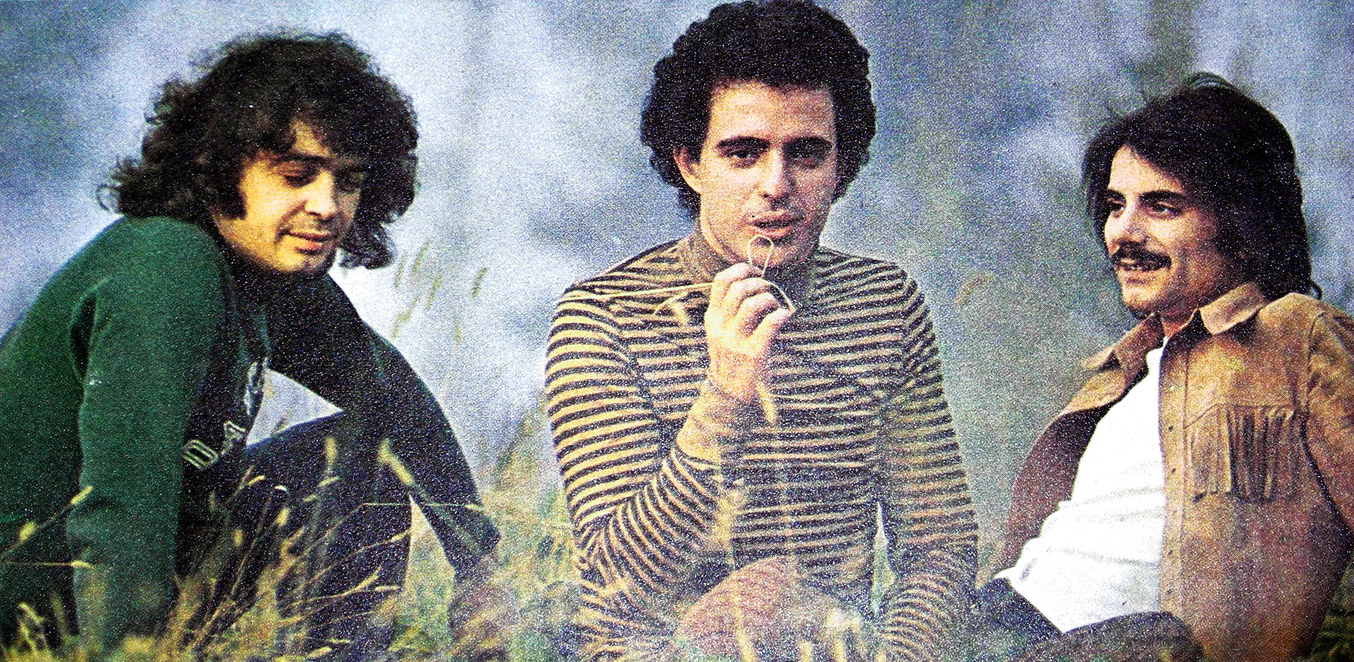 I componenti dei The Pleasure Machine: a sinistra Ellade Bandini, al centro Vince Tempera, a destra Ares Tavolazzi. Autore: foto di autore anonimo del 1971, digitalizzata da Vito Vita. Licensing 1971 1971